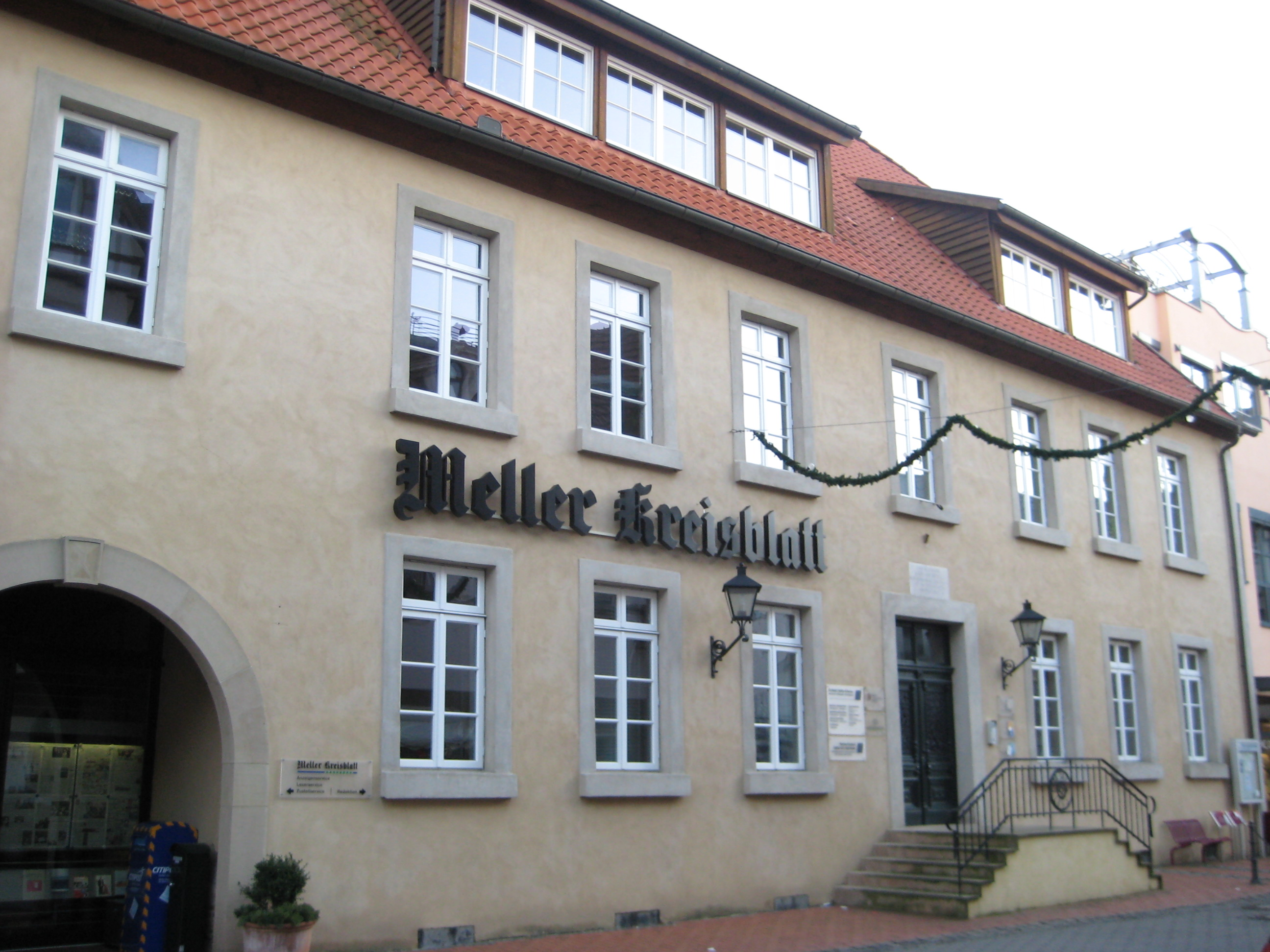 Sitz des Meller Kreisblatts an der Stelle des so genannten "Hauses vor Melle", das sich vor dem Stadttor befand. Das Haus vor Melle wurde nach dem Stadtband von 1720 von den örtlichen Protestanten für Gottesdienste genutzt. Justus Mösers Tochter Johanna von Voigt, eine Brieffreundin Goethes, lebte darin 1768-1796. Das ursprüngliche Gebäude wurde im frühen 19. Jahrhundert neu gebaut.